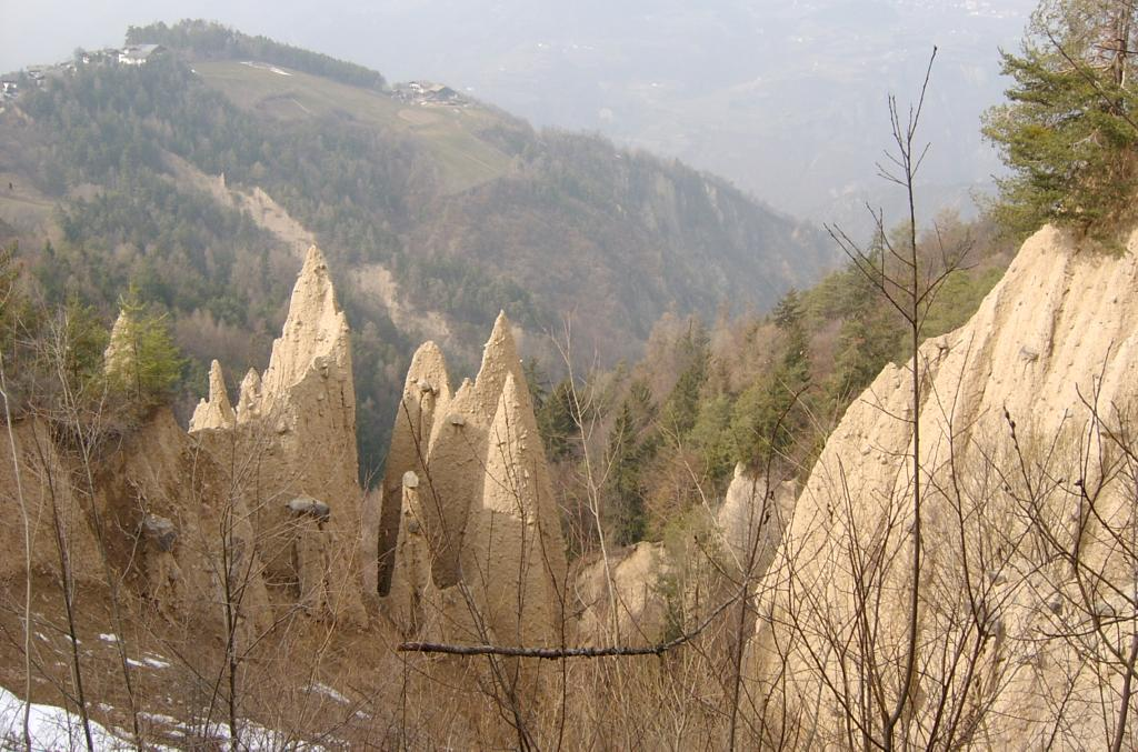 Steinegger Erdpyramiden, Karneid (it. Cornedo all'Isarco), Südtirol